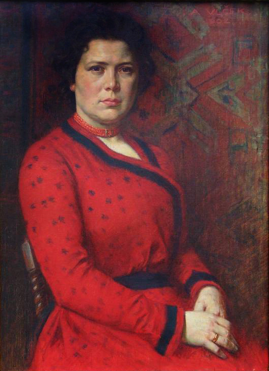 Bronislava Herbenová (1861 - 1942), Česká spisovatelka a překladatelka.